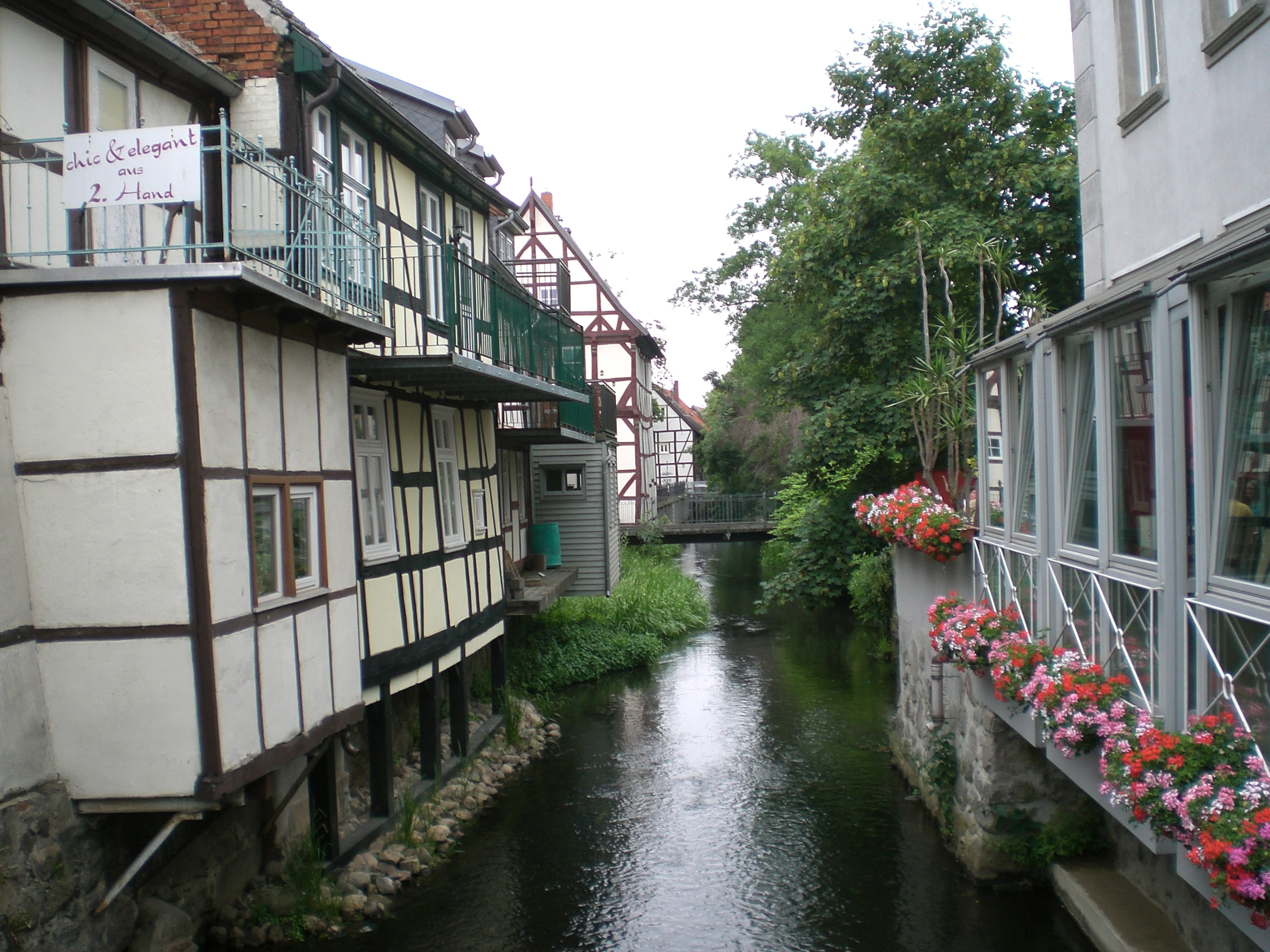 Westlicher Jeetzearm in Salzwedel an der Neuperverstraße nach Norden